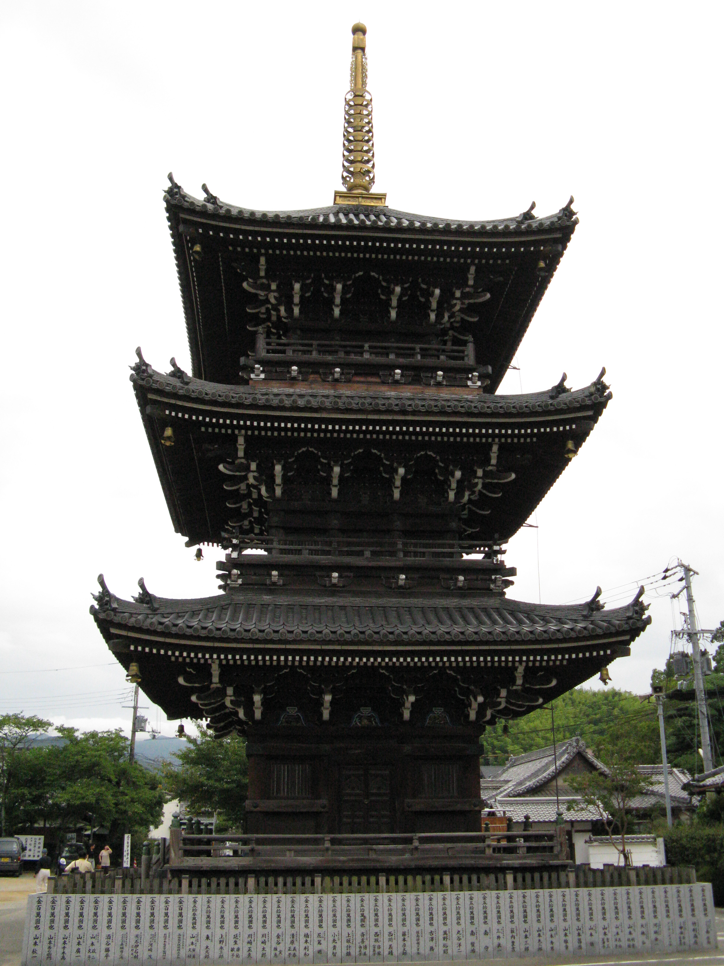 水間寺 三重の塔